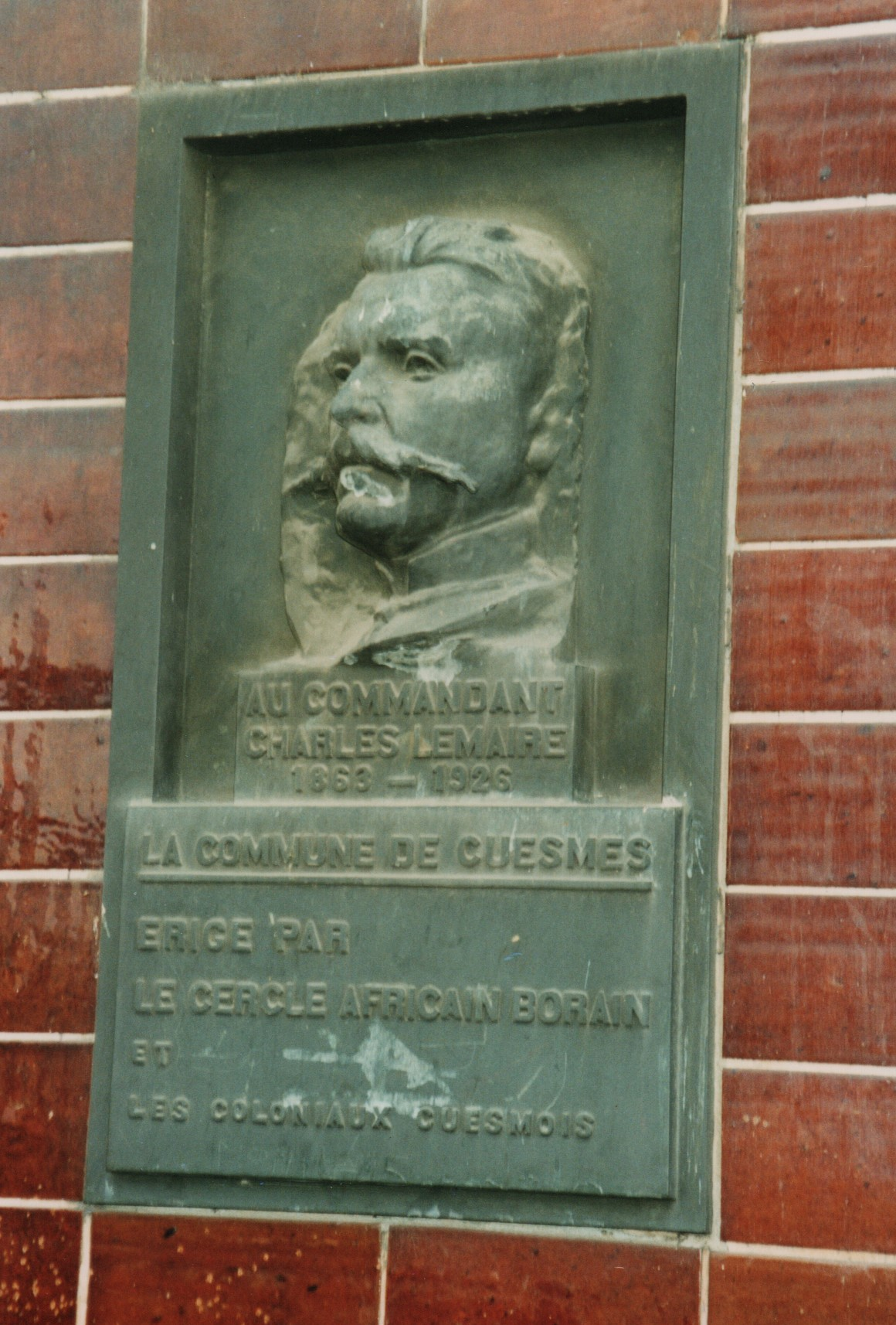 Bas-relief ter herinnering aan Charles Lemaire (1863-1926) te Cuesmes (Mons). Afbeelding uit oktober 1997. Tekst: AU COMMANDANT CHARLES LEMAIRE 1863-1926 | LA COMMUNE DE CUESMES | ERIGE PAR LE CERCLE AFRICAIN BORAIN ET LES COLONIAUX DE CUESMES.